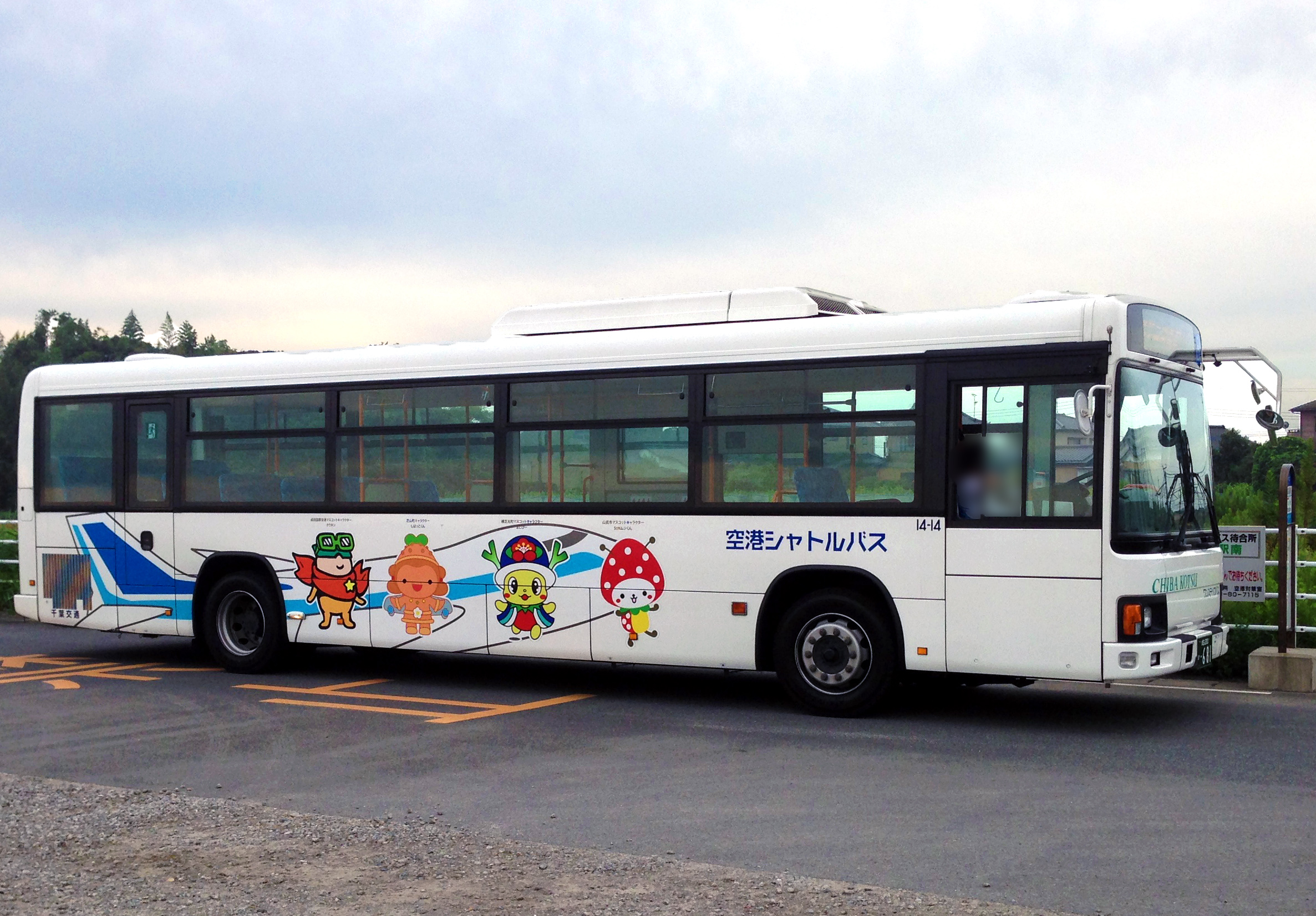 現在の専用車